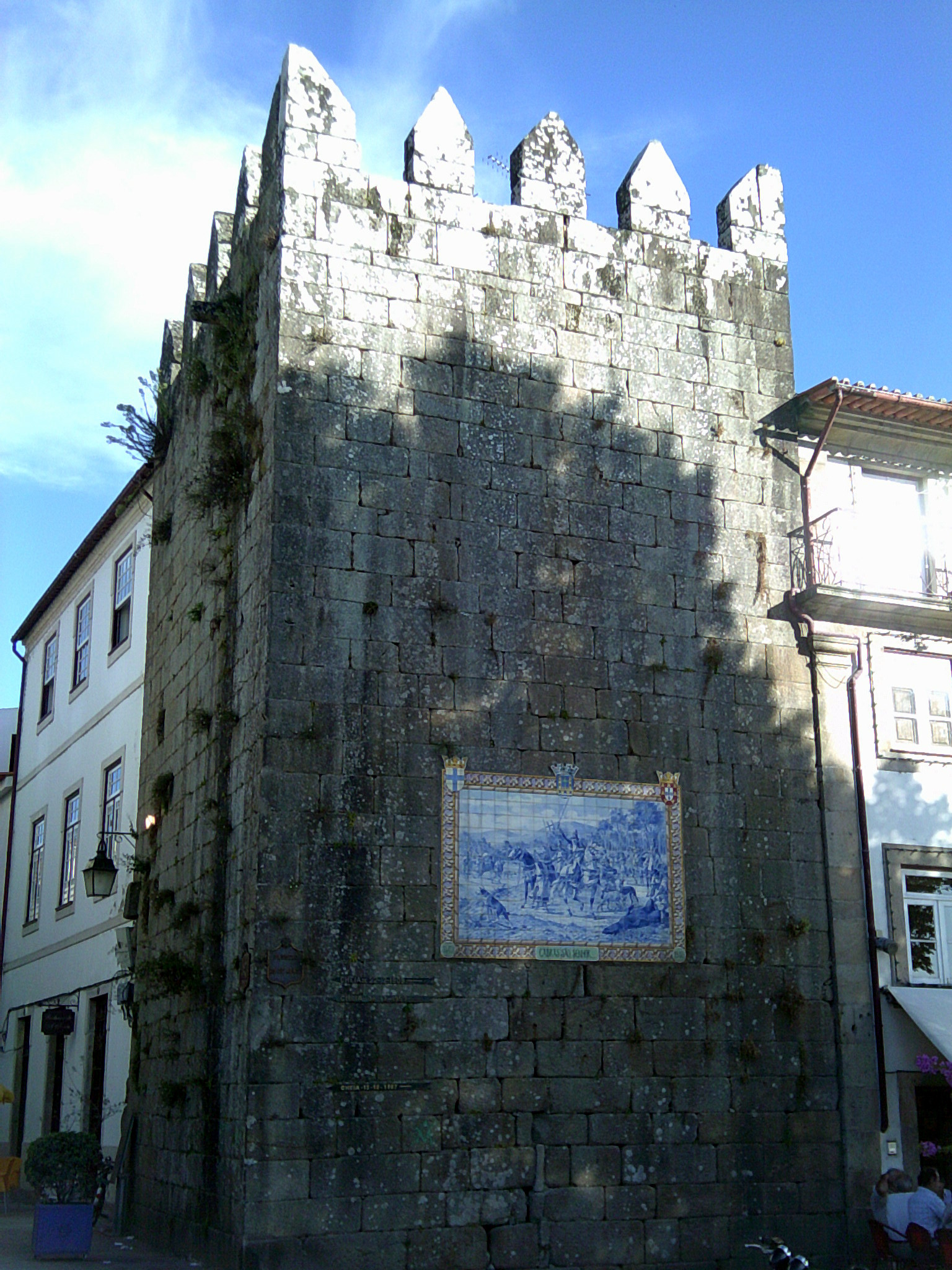 Torre de São Paulo, freguesia de Ponte de Lima, vila e concelho de mesmo nome, distrito de Viana do Castelo, Portugal.